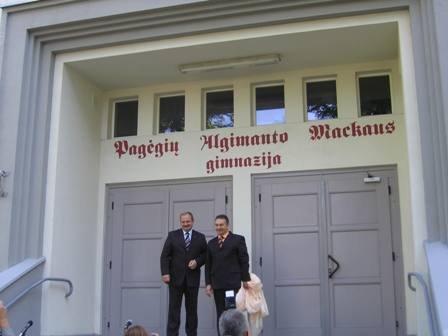 Pavadinimo atidengimas